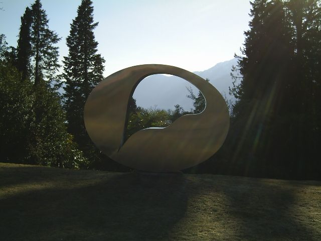 Hans Arp: „Roue Oriflamme“/ „Goldflammendes Rad“ (1962) at Monte Verita in Ticino/Switzerland